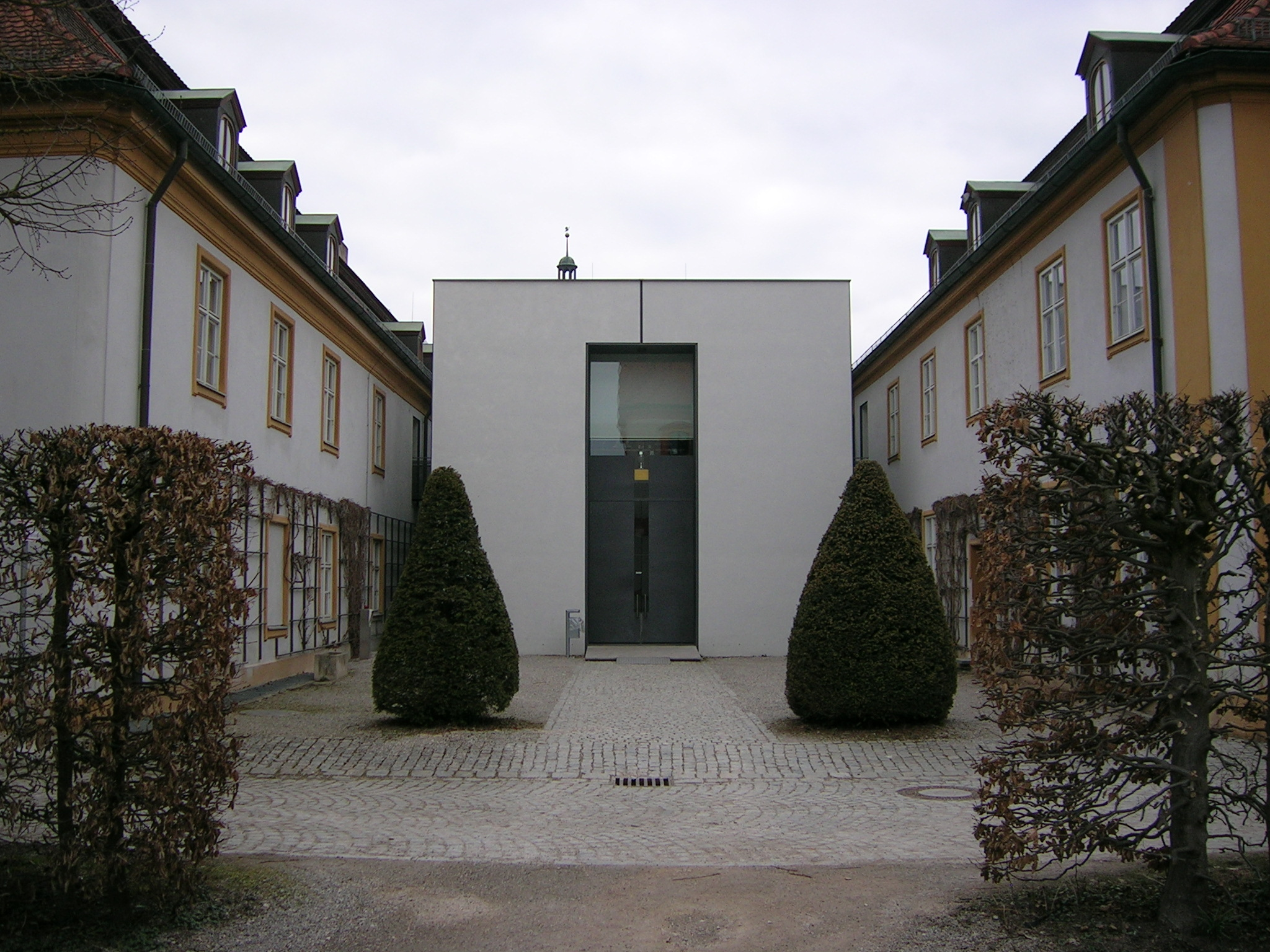 Ostenstraße 22 und 24 Eichstätt: Ehemalige Orangerie.